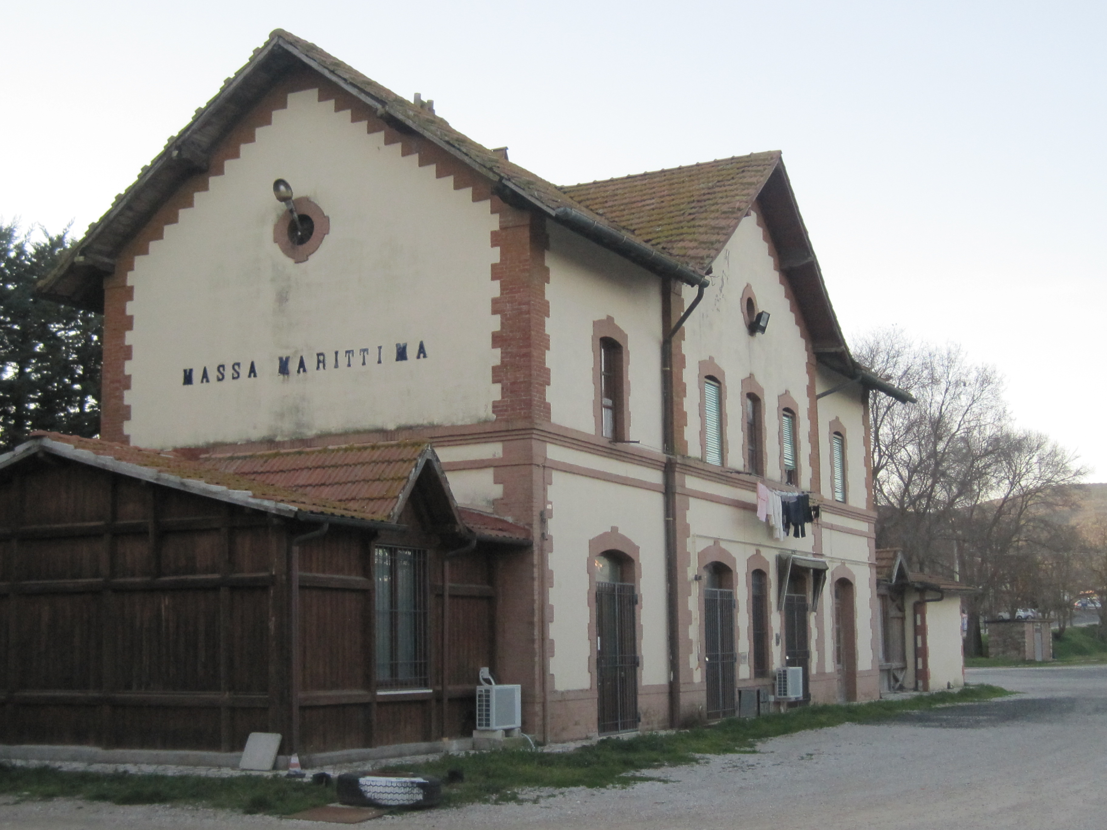 Stazione ferroviaria di Massa Marittima.